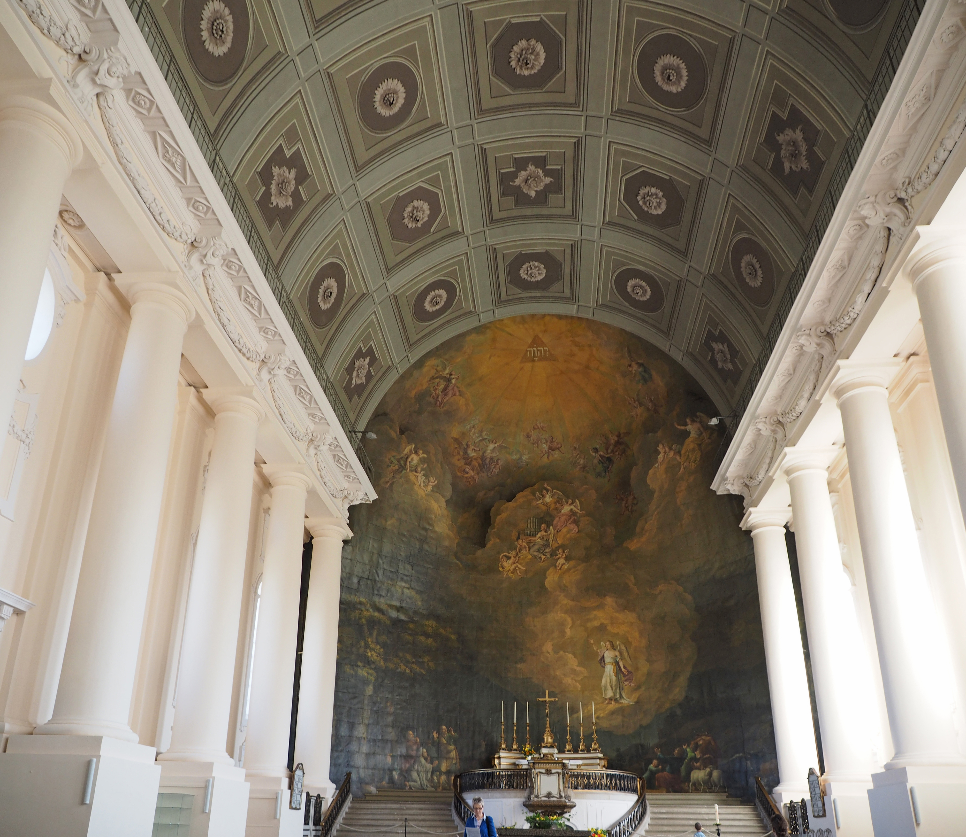 Innenraum der Stadtkirche Ludwigslust mit Altargemälde